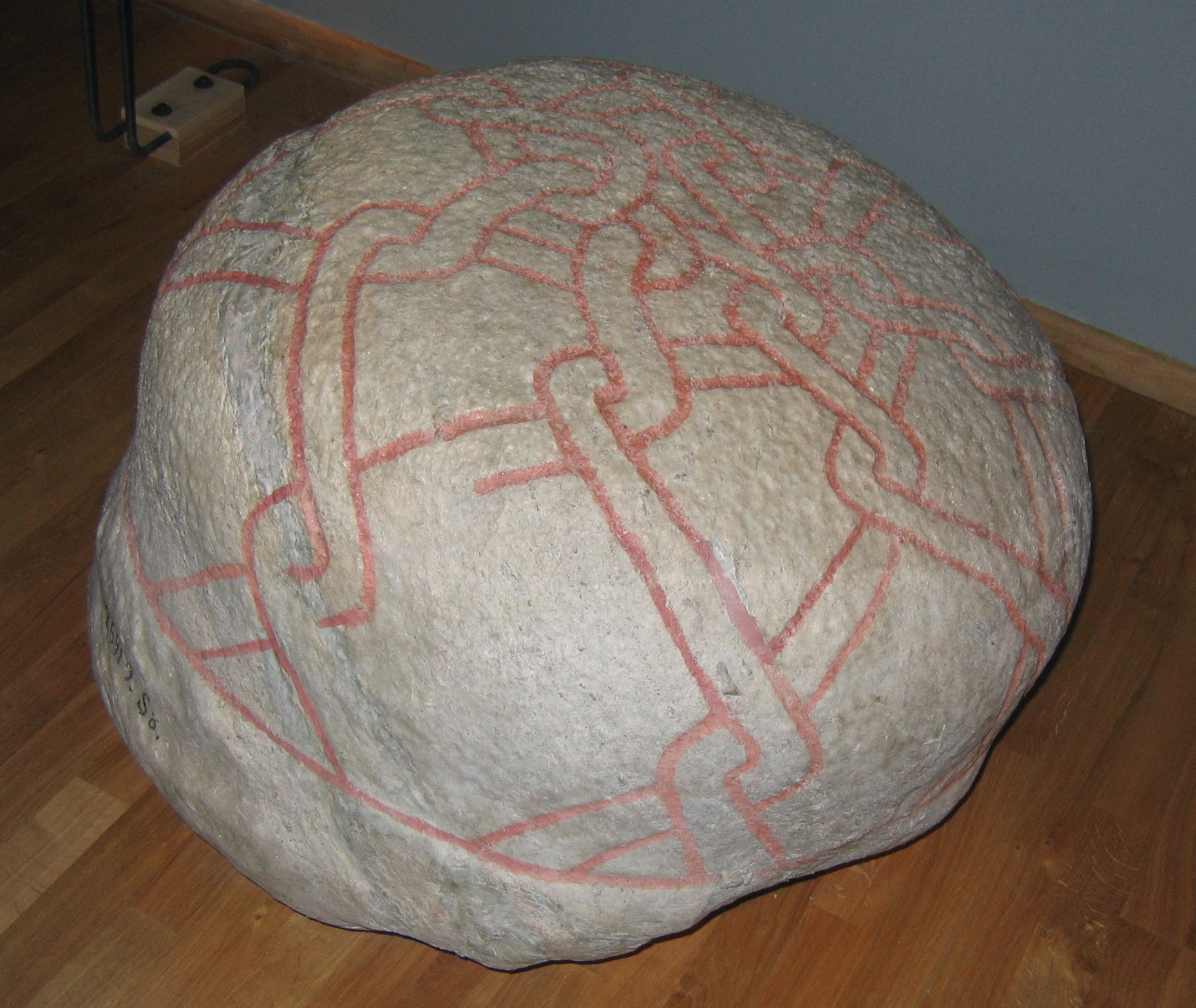 grave orb